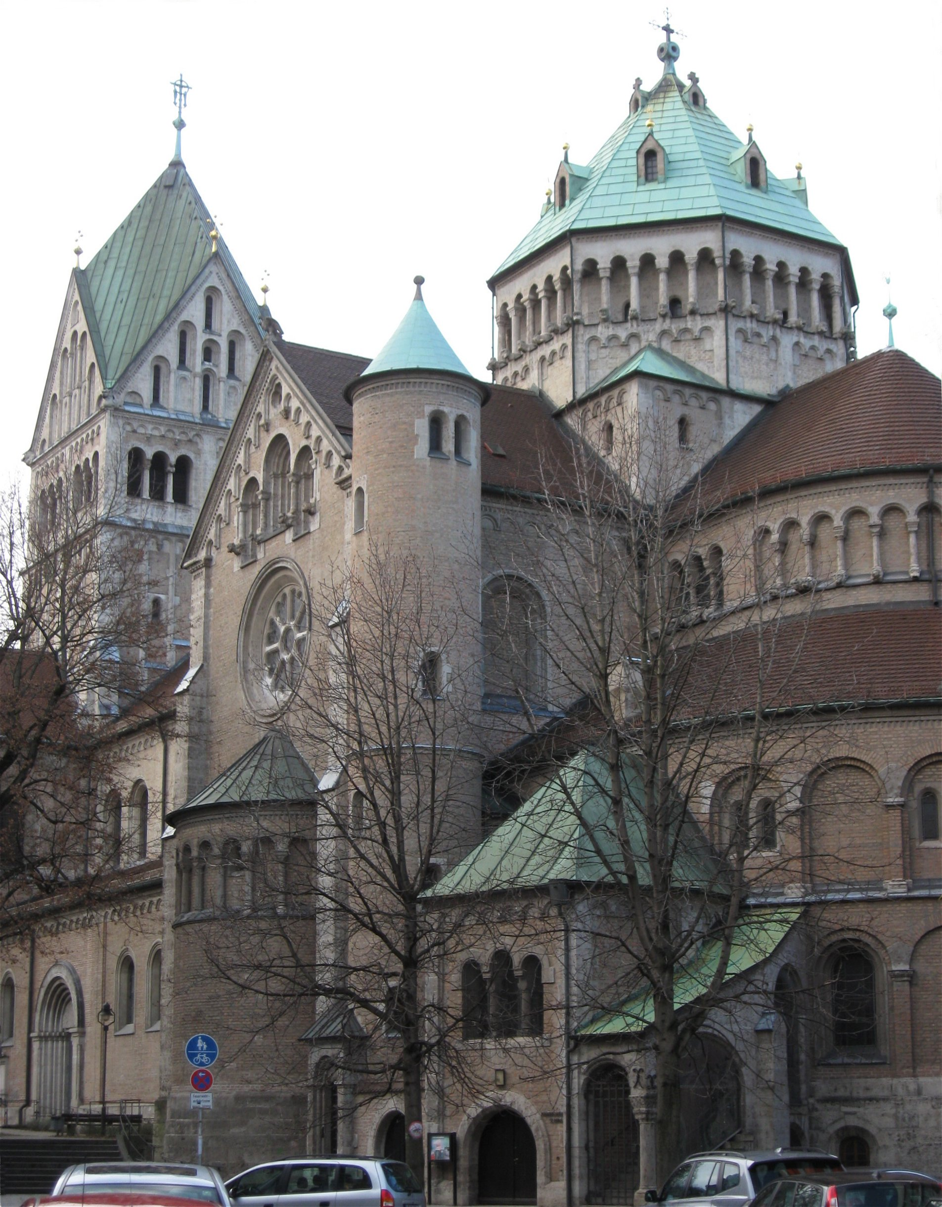 Pfarrkirche St. Anna in Müenchen (Lehel)